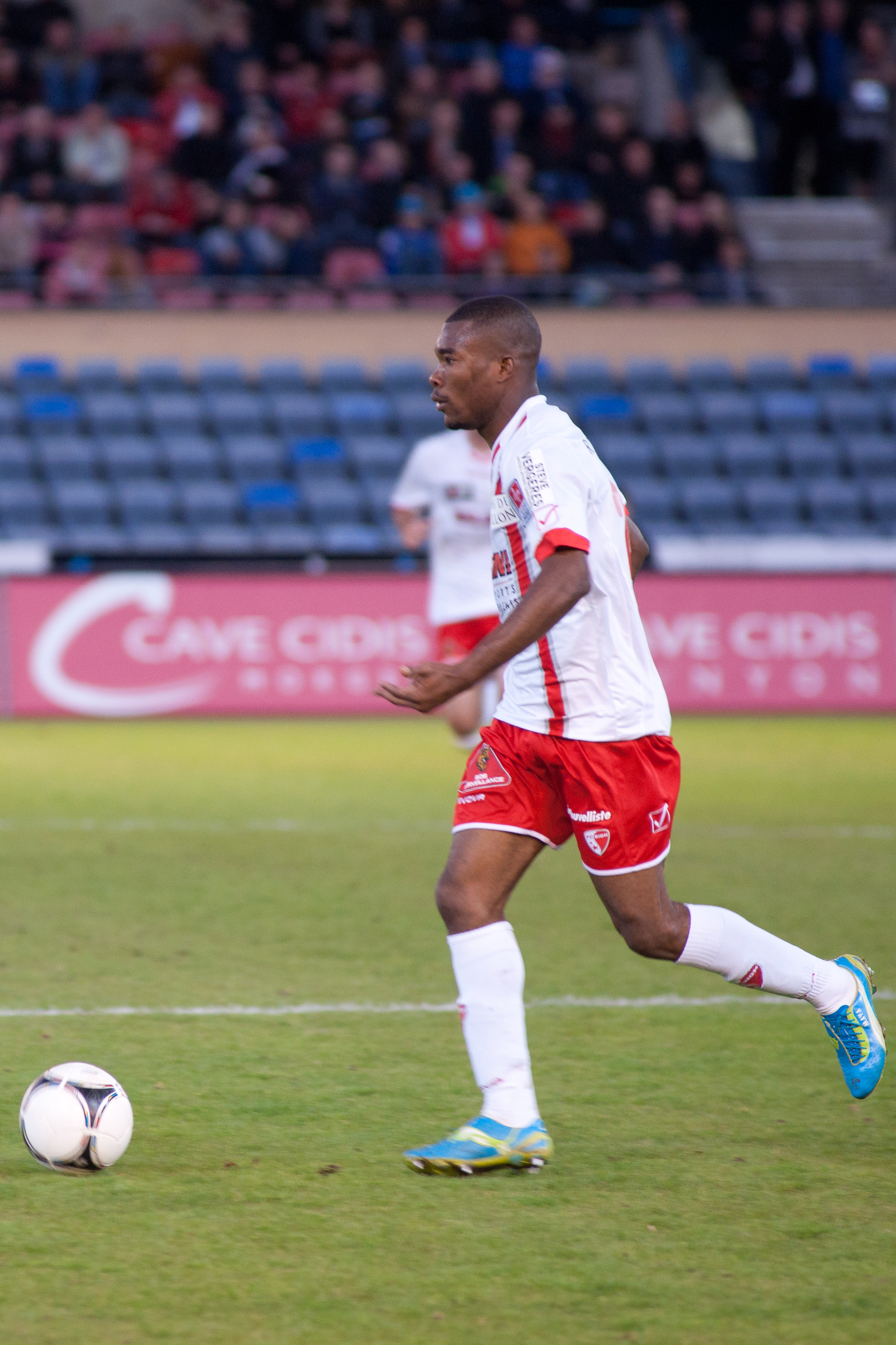 Geoffroy Serey Die - Lausanne vs Sion 02 may 2012